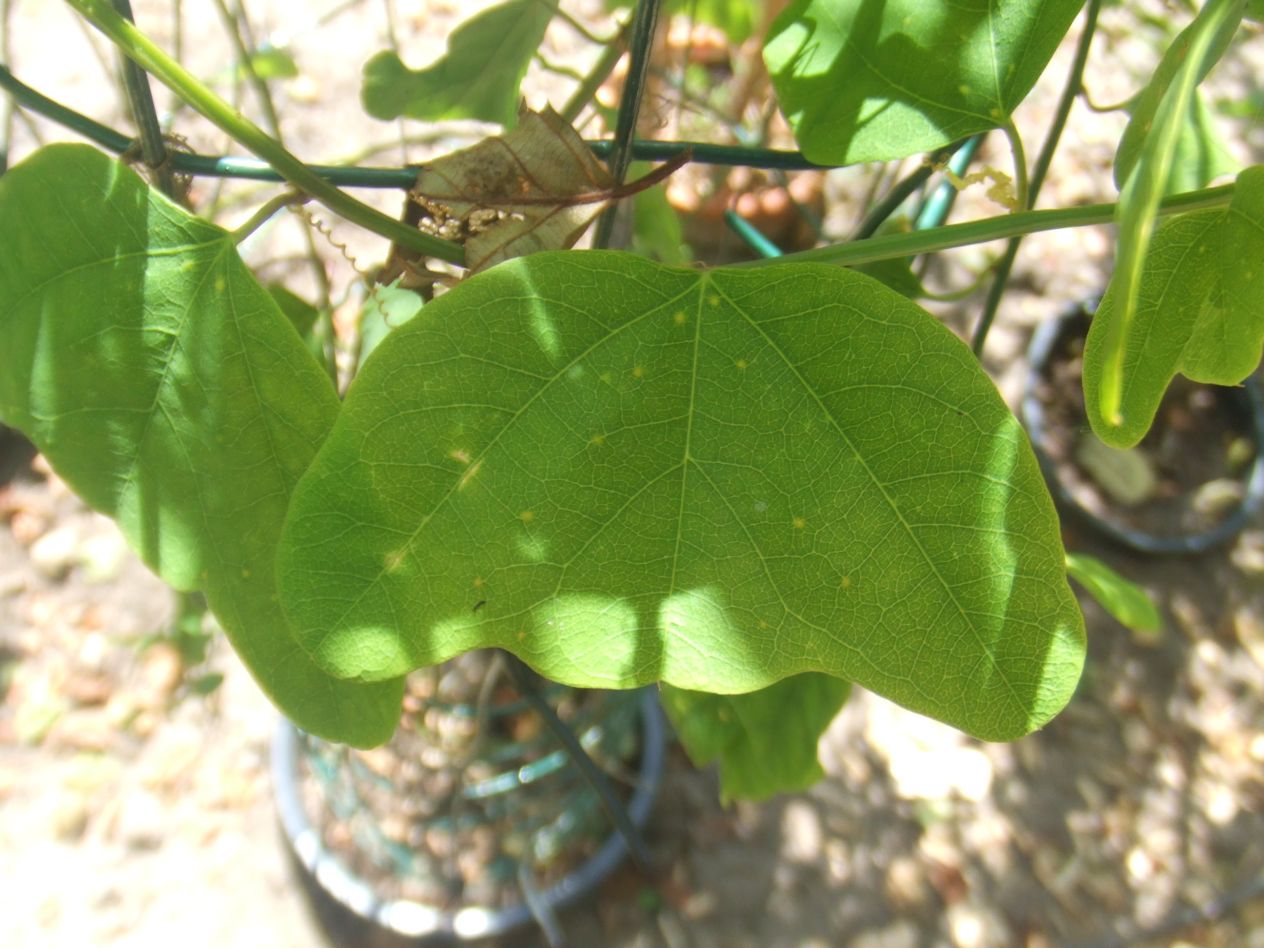 Passiflora biflora bij de Passiflorahoeve in Harskamp, Nederland